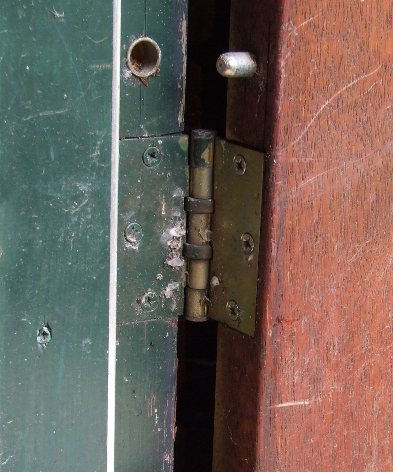 Zelfgemaakte foto gemaakt door Sindala op 4 maart 2007.